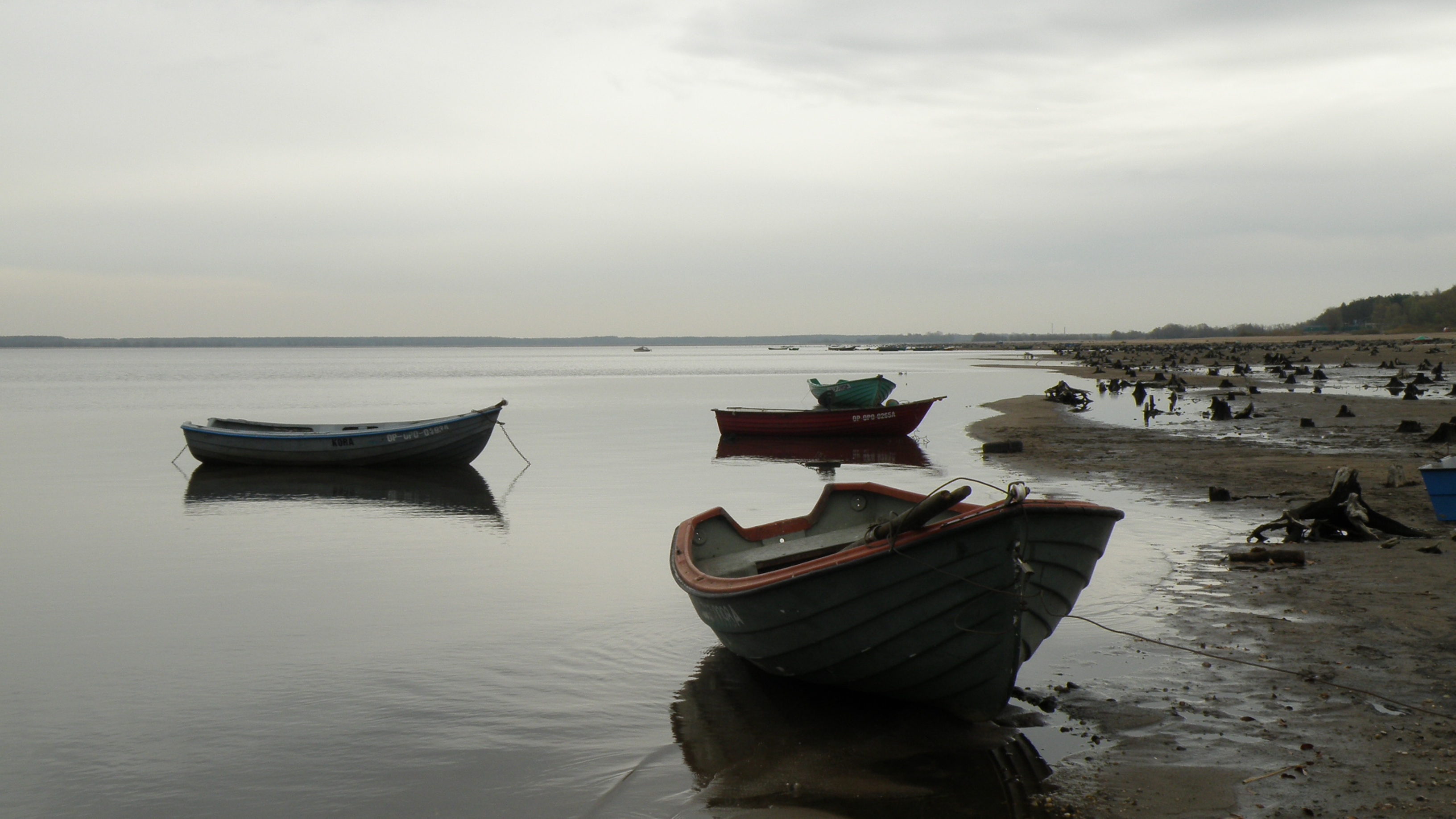 Obszar specjalnej ochrony ptaków Zbiornik Turawa. This is a photography of Natura 2000 protected area with ID PLB160004